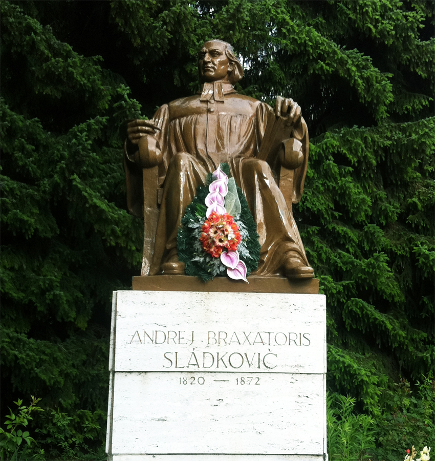 Bronzová plastika Andreja Sladkoviča v mestskej časti Radvaň z roku 1940